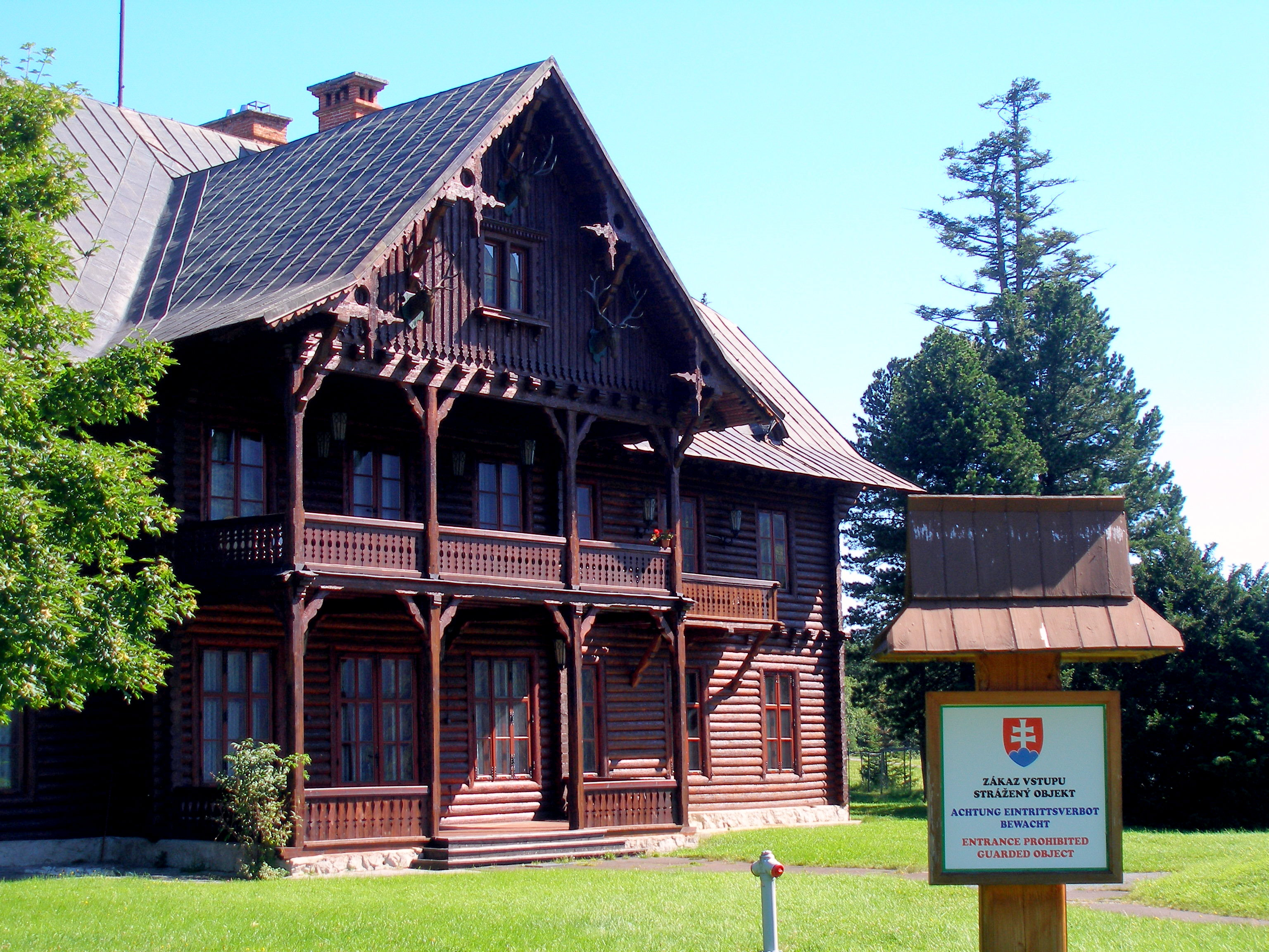 Podtatranská obec Tatranská Javorina.